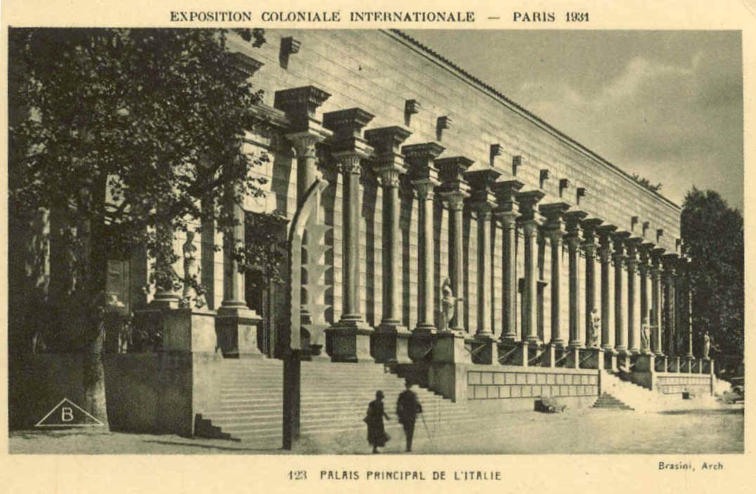 Pavillon de l'Italie à l'Exposition Coloniale de PARIS en 1931